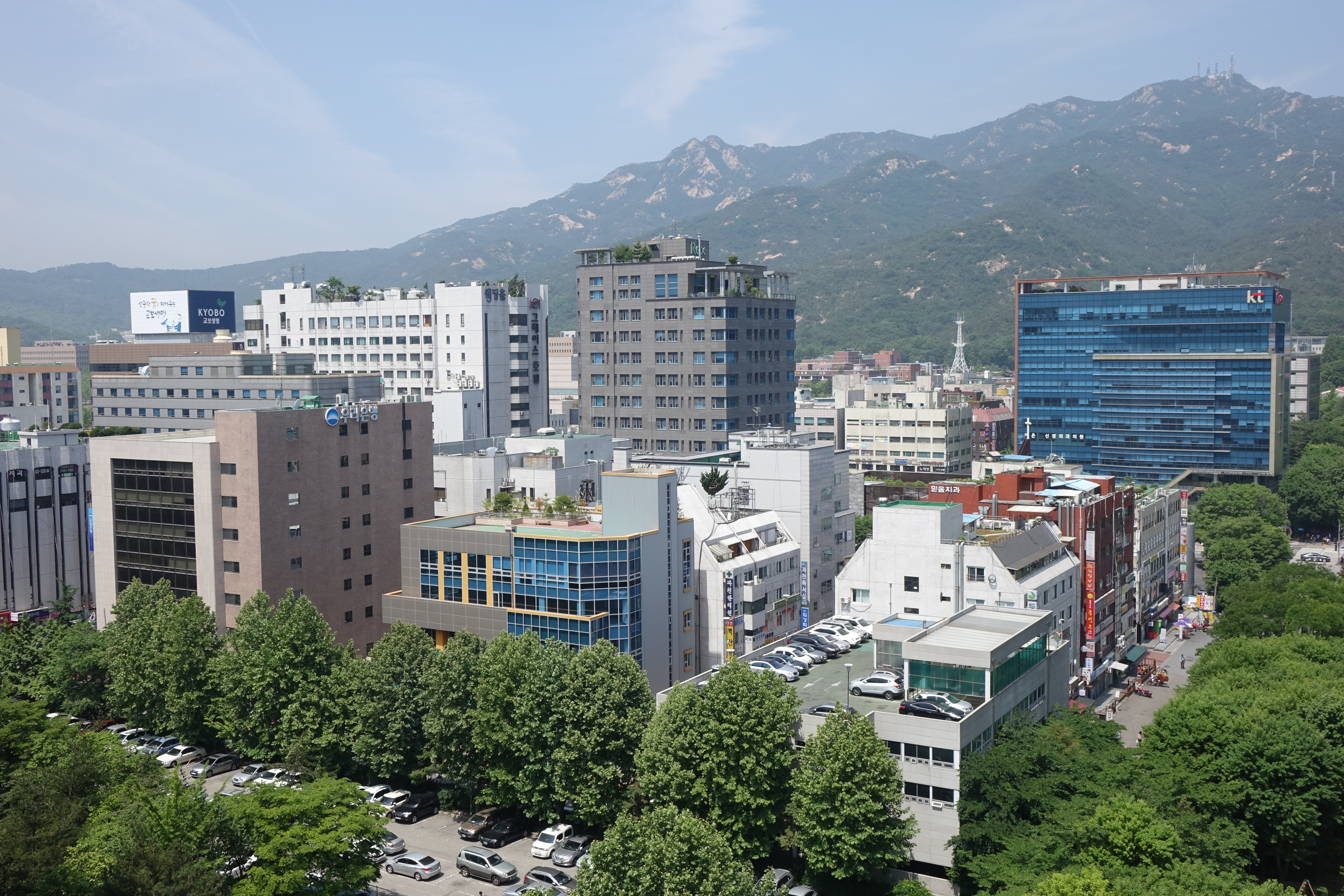 2015년 6월 경기도 과천시